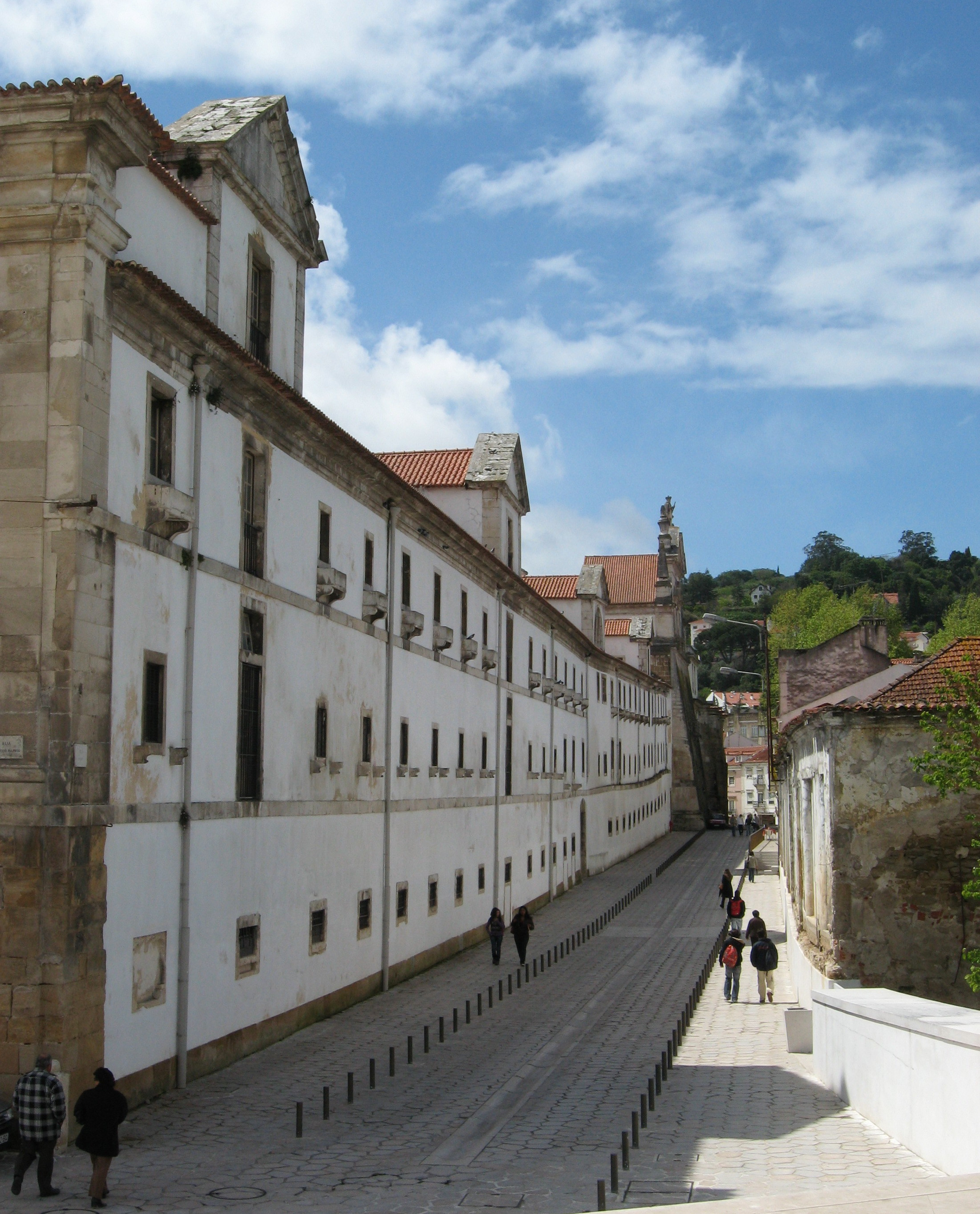 Mosteiro de Alcobaça, north side of Claustro do Rachadoiro and Claustro da Levada, Rua D. Pedro V.